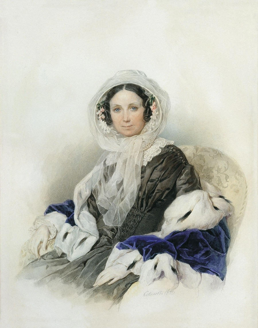 П.Ф.Соколов. Портрет Е.Ф.Рюминой. 1847. Бристольский картон, акварель, белила, лак. Государственный музей А.С.Пушкина Елена Федоровна Рюмина, урожденная Кандалинцева (1800–1874), жена тайного советника Н.Г.Рюмина (1793–1870), сына рязанского миллионера.